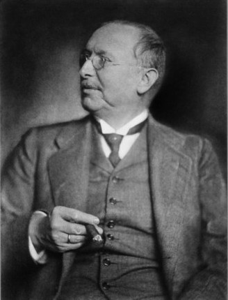 Depicted person: Dankmar Schultz-Hencke